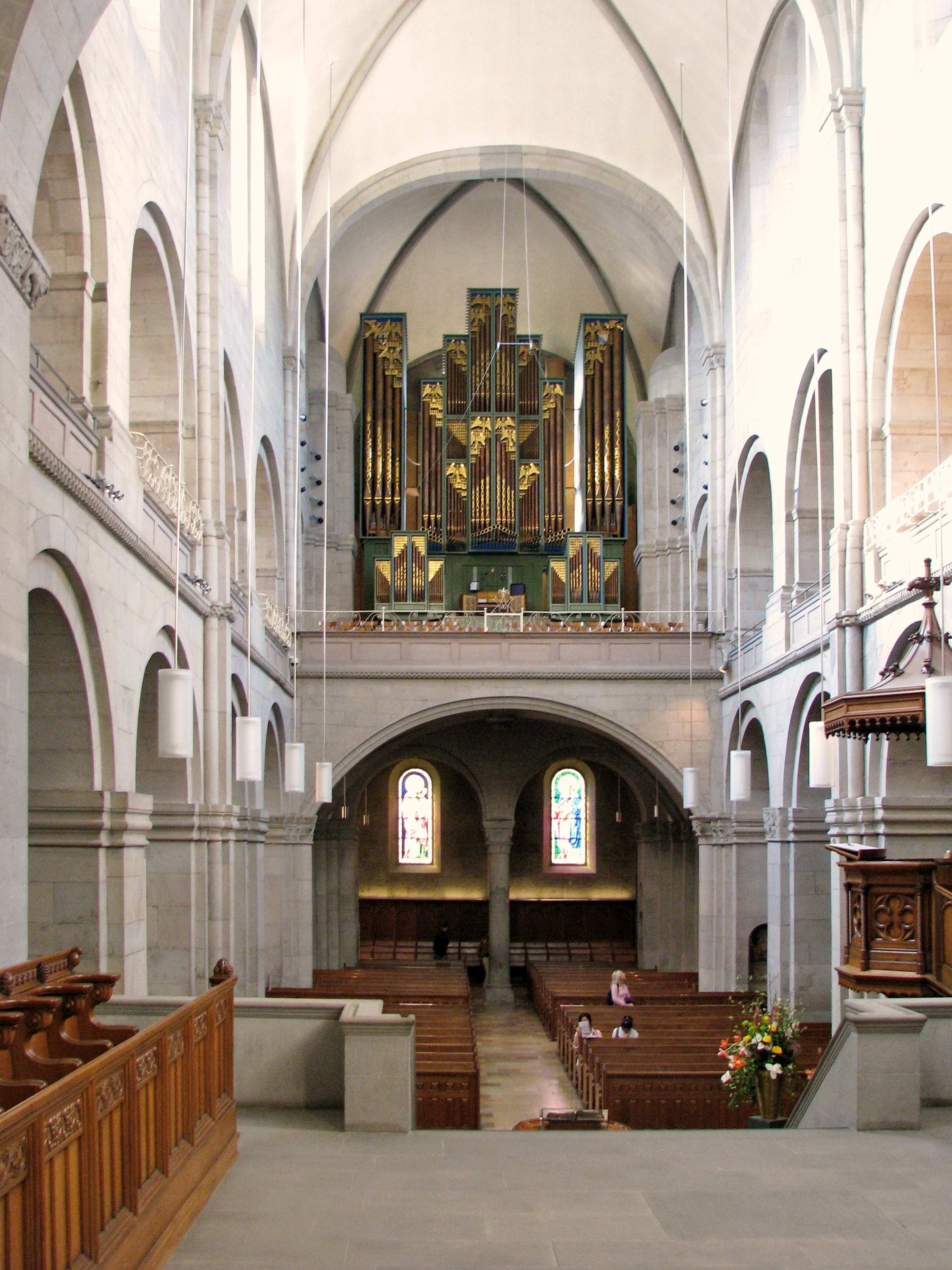 Interior view of Grossmünster in Zürich (Switzerland)